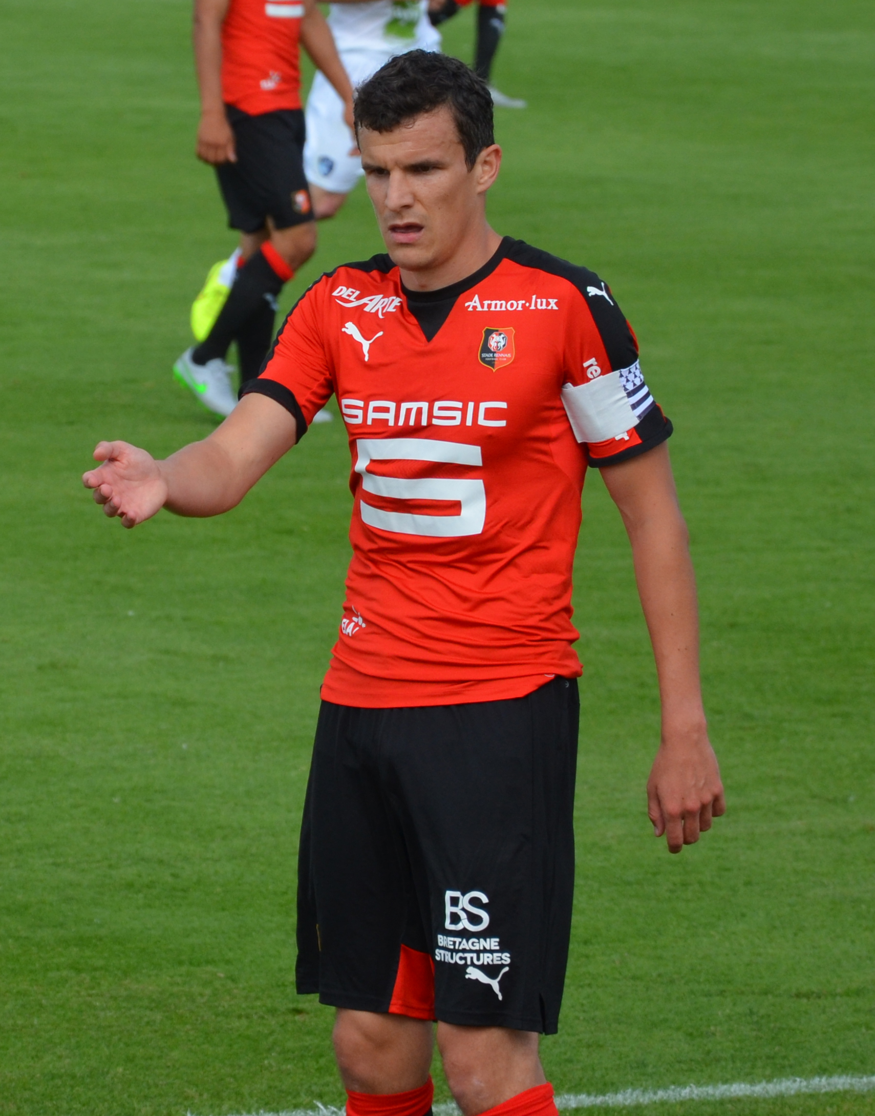 Photographie prise lors du match opposant le Stade rennais au Havre AC en amical au stade Paul-Audrin de Dinard le 8 juillet 2015. Ici, Romain Danzé.